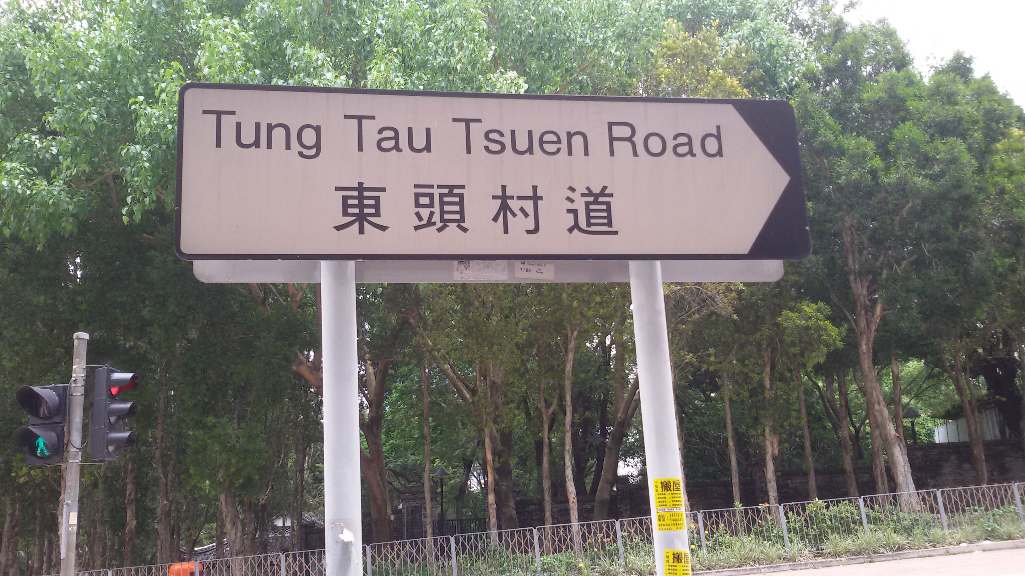 粵語: 東頭村道嘅路牌